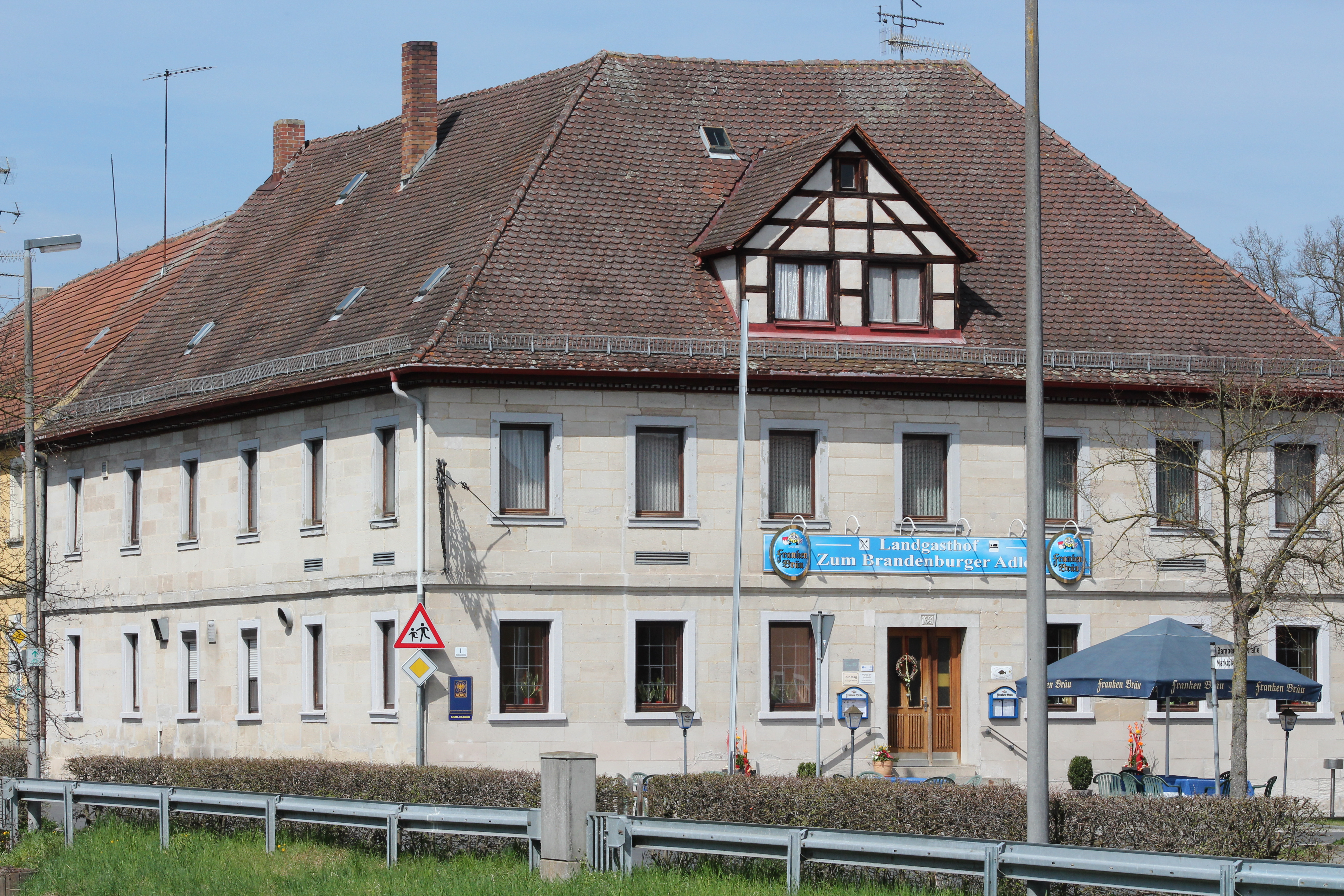 Brandenburger Adler von Osten